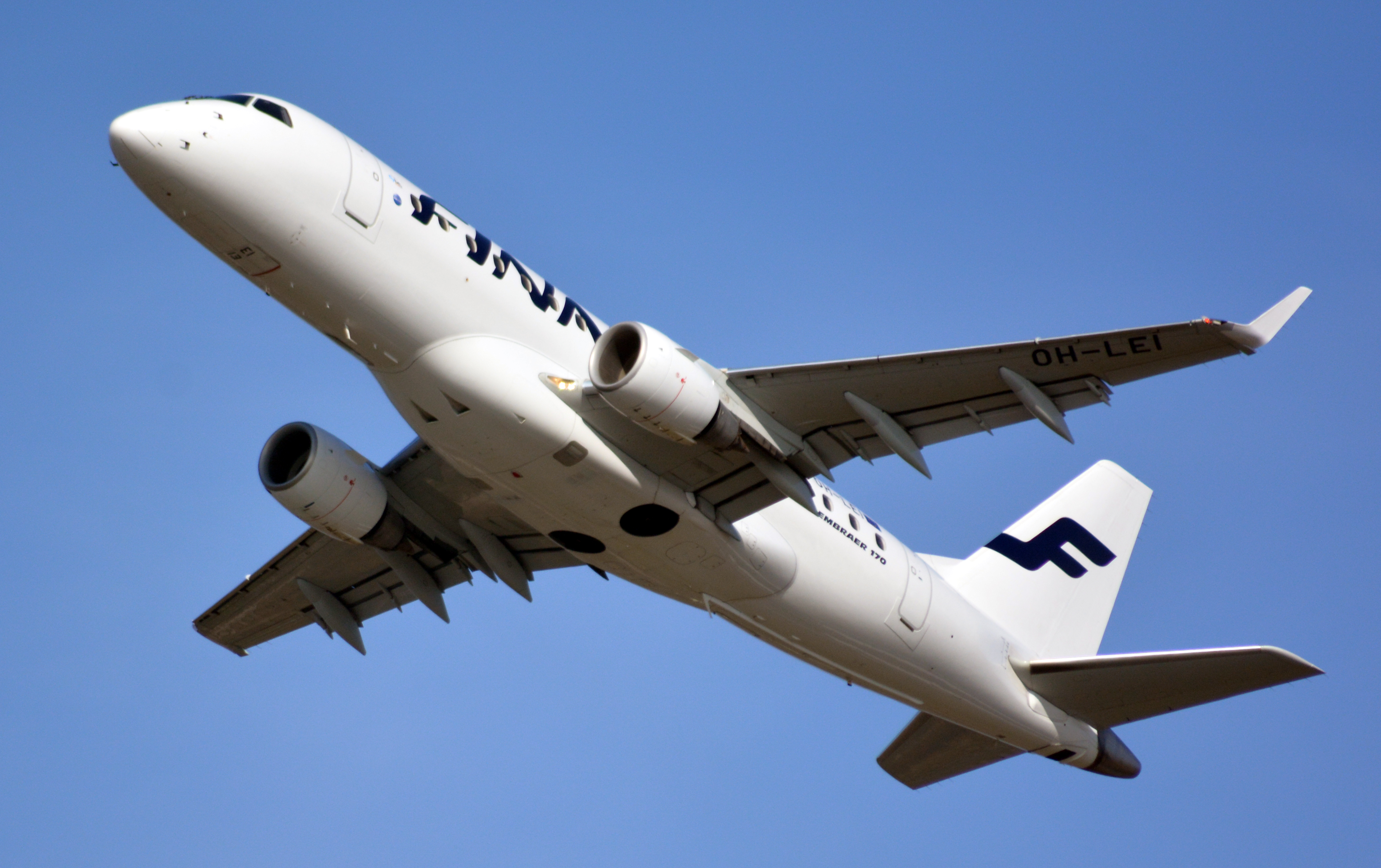 Embraer ERJ-170-100STD (OH-LEI) auf dem Hamburg Airport